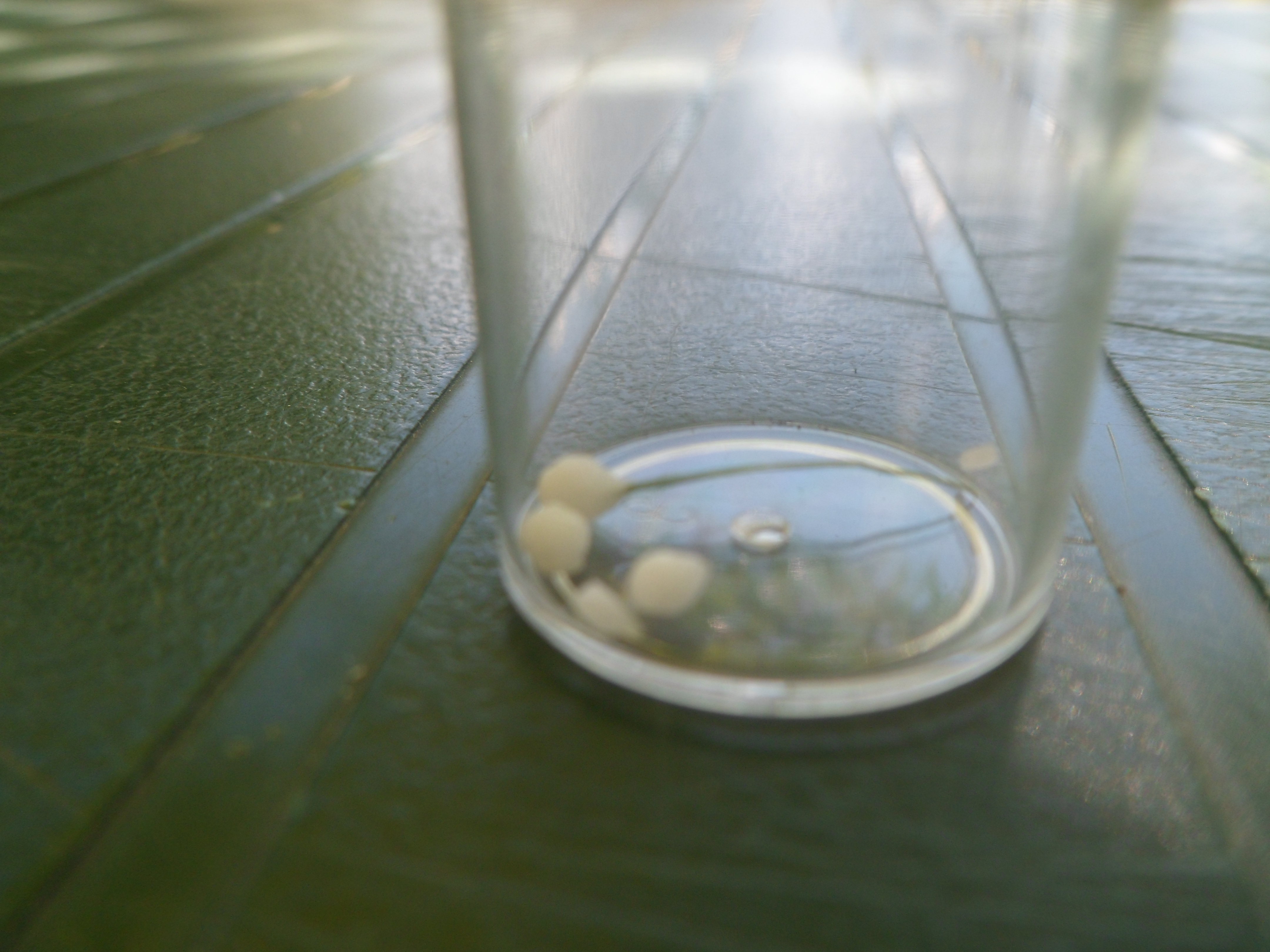 La manne de Briançon est issue du suintement de l'épine du mélèze qui produit une sève élaborée pour survivre aux conditions climatiques extrêmes en été.